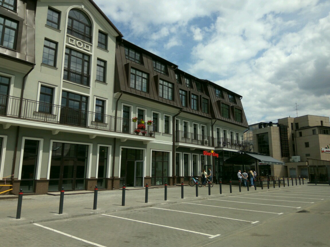 Мінск. Зыбіцкая вуліца